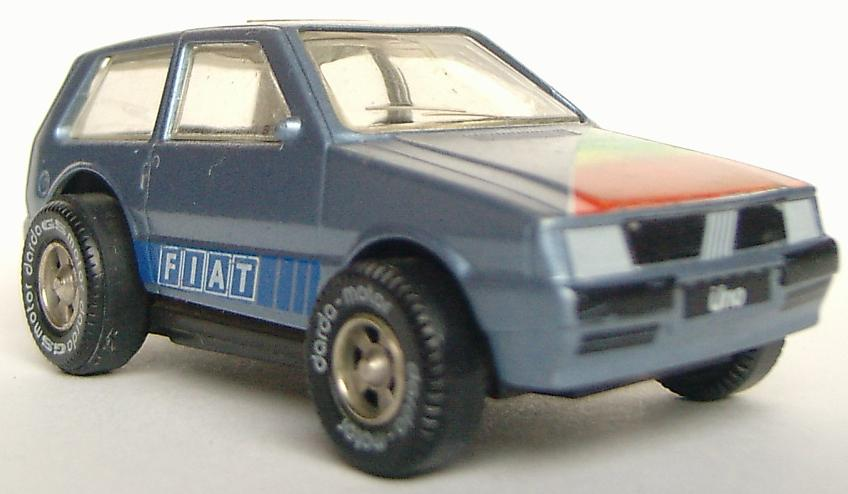 Darda FIAT Uno Licensing Categorie:Afbeelding modelbouw